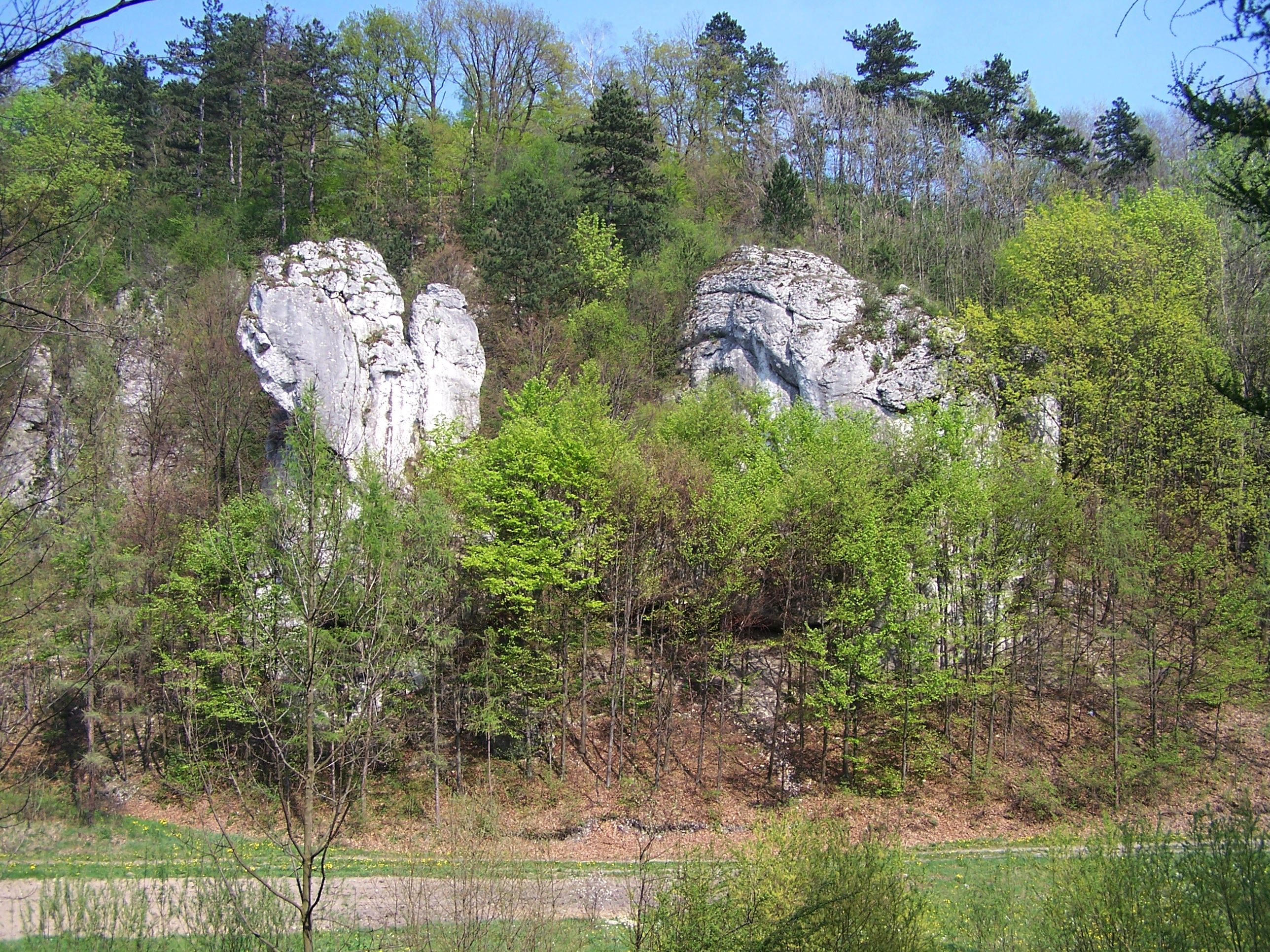 Dolina Brzoskwinki (Wyżyna Krakowsko-Częstochowska)